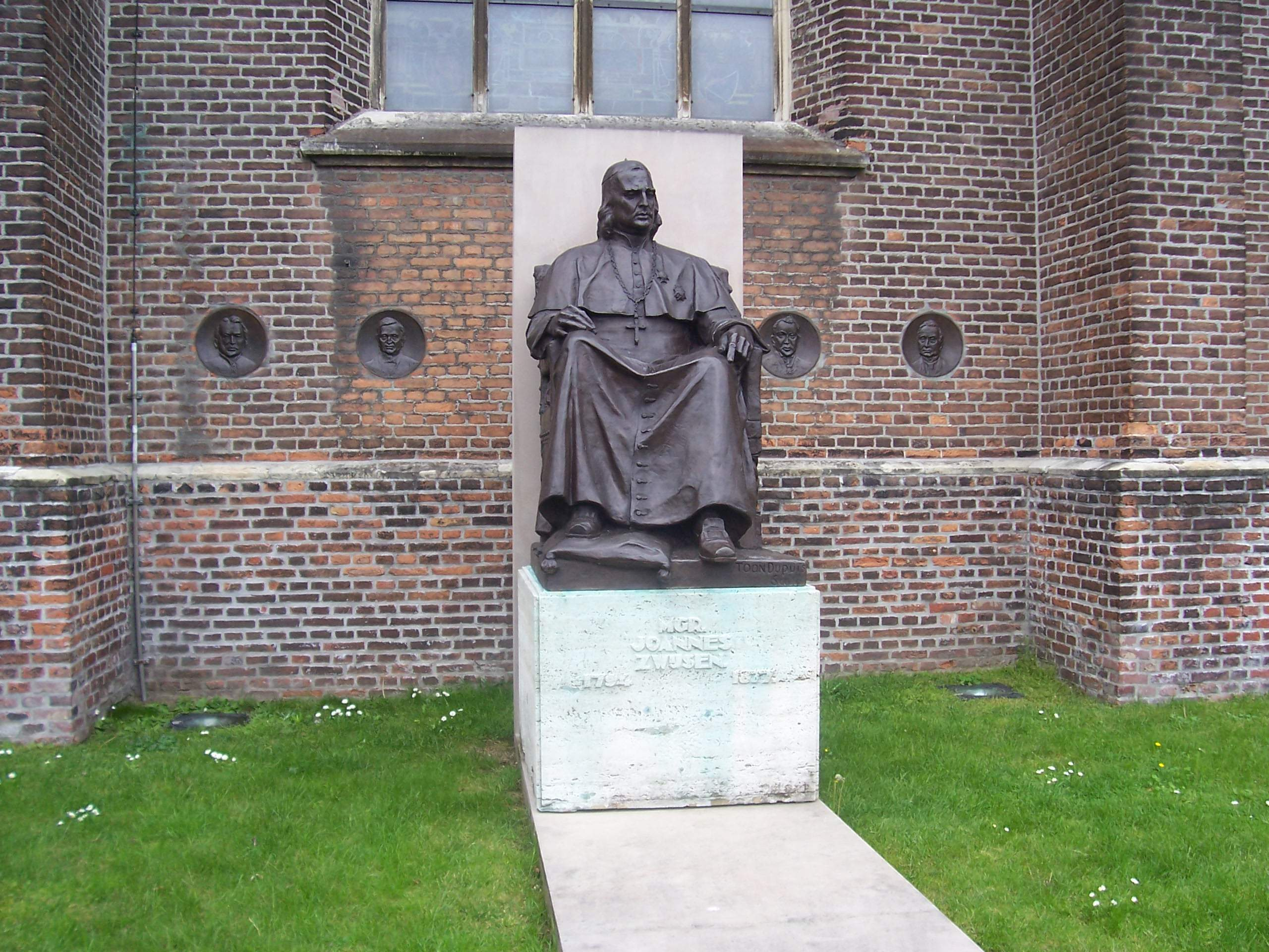 Joannes Zwijsen, bronzen beeld Tilburg, Heikesekerk, Stadhuisstraat 6.